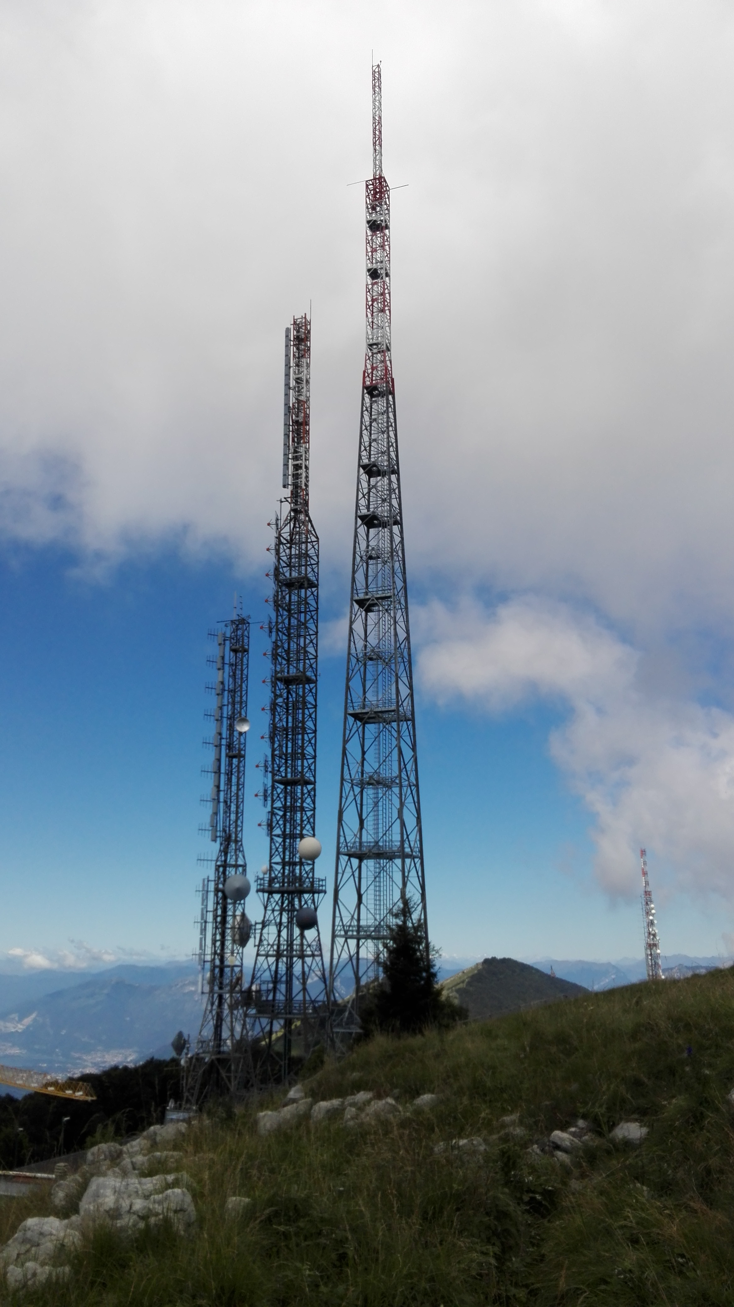 Alcuni trasmettitori del Centro Trasmittente situati a Prato della Costa con Torre H=150m di nuova costruzione